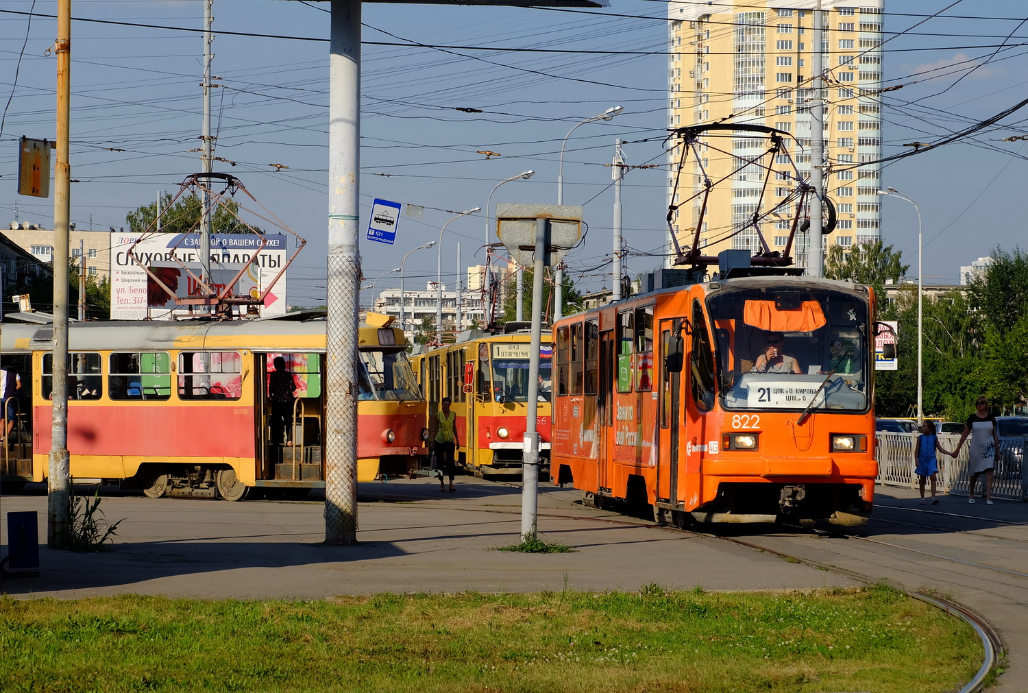 Трамваи на остановке (кольце) "Волгоградская" в Екатеринбурге